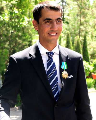 Равшан Ирматов